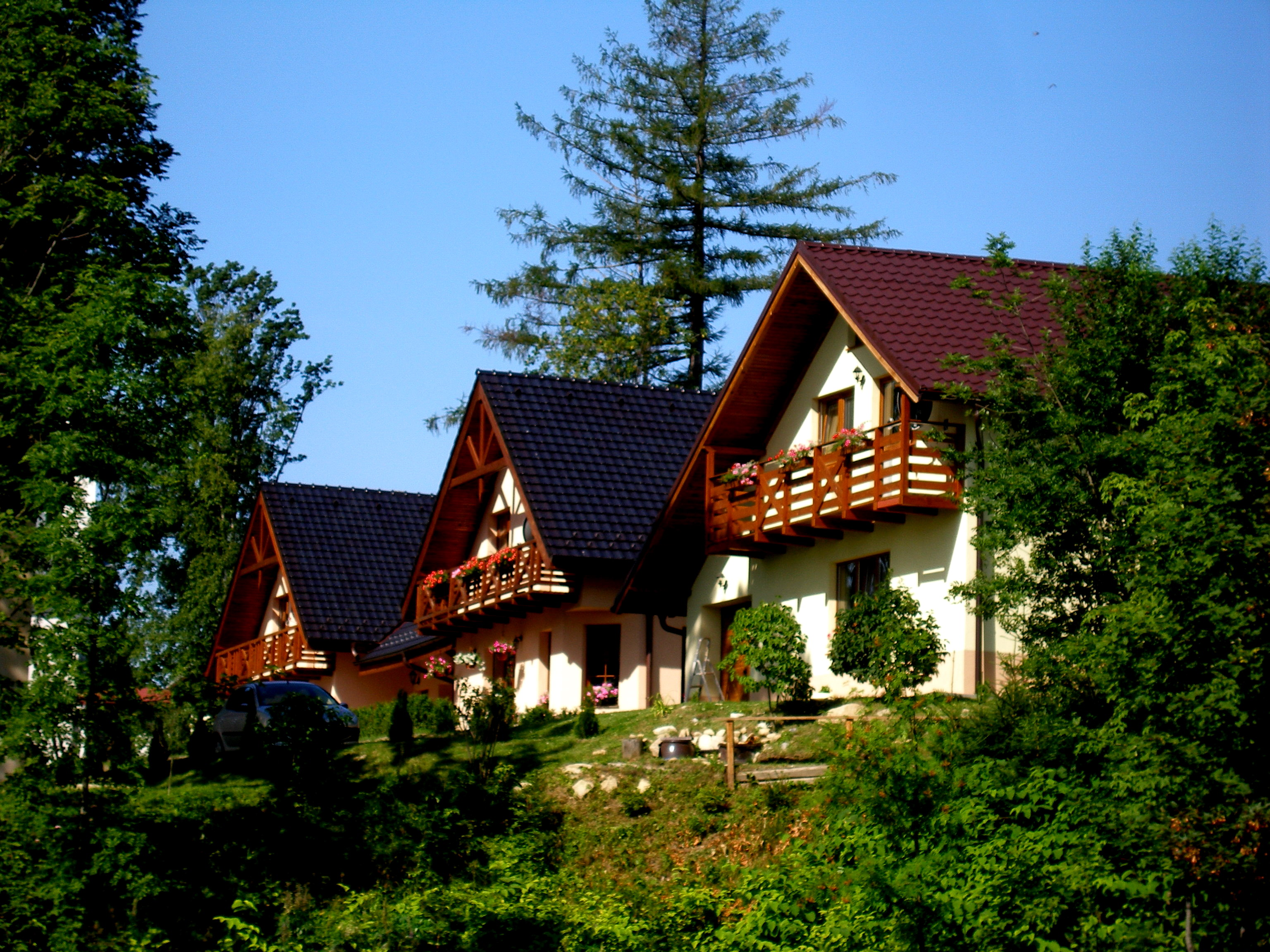 Tatranská osada Nový Smokovec, mesto Vysoké Tatry, okres Poprad